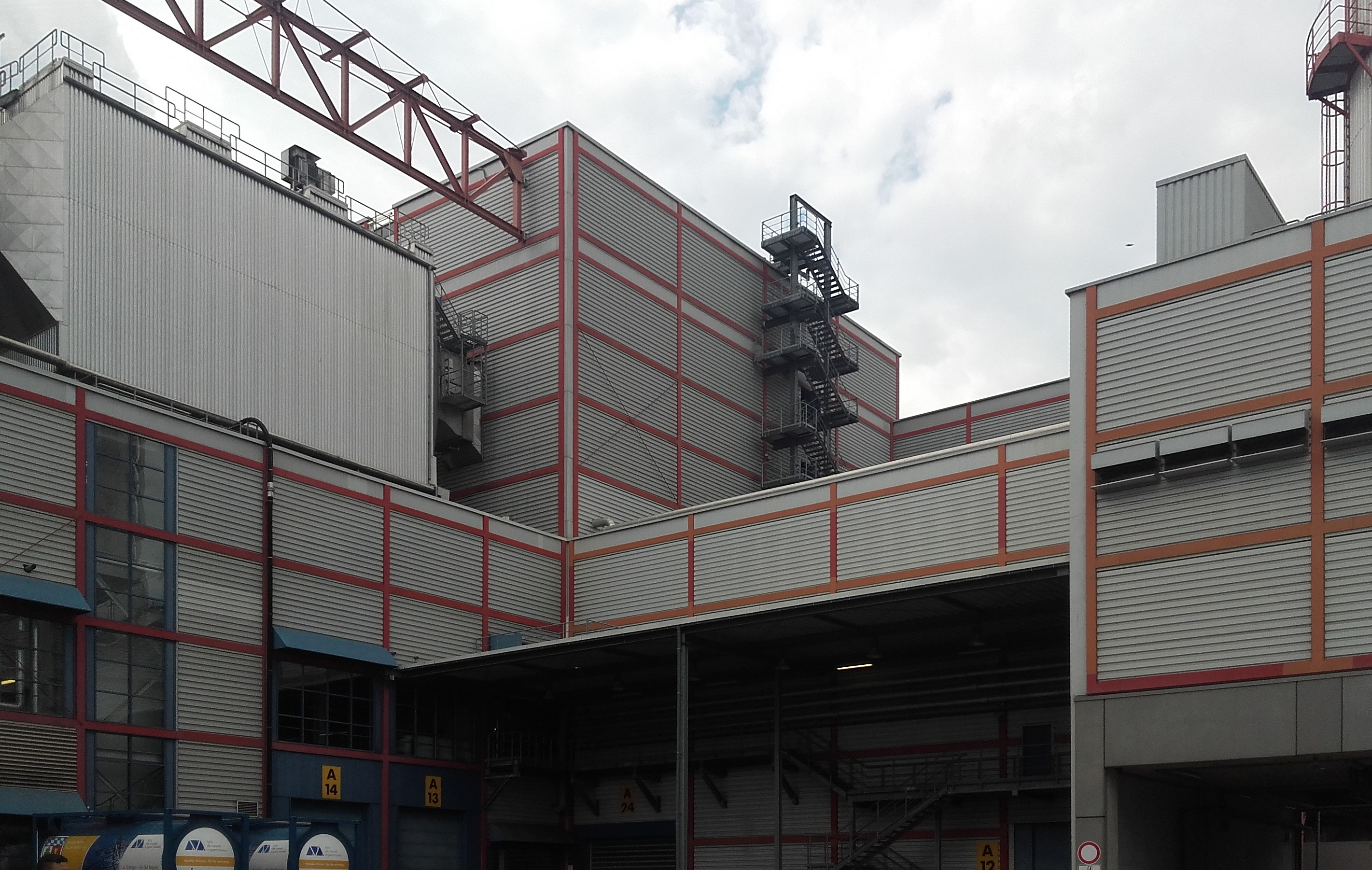 Blick auf das Abfalheizkraftwerk